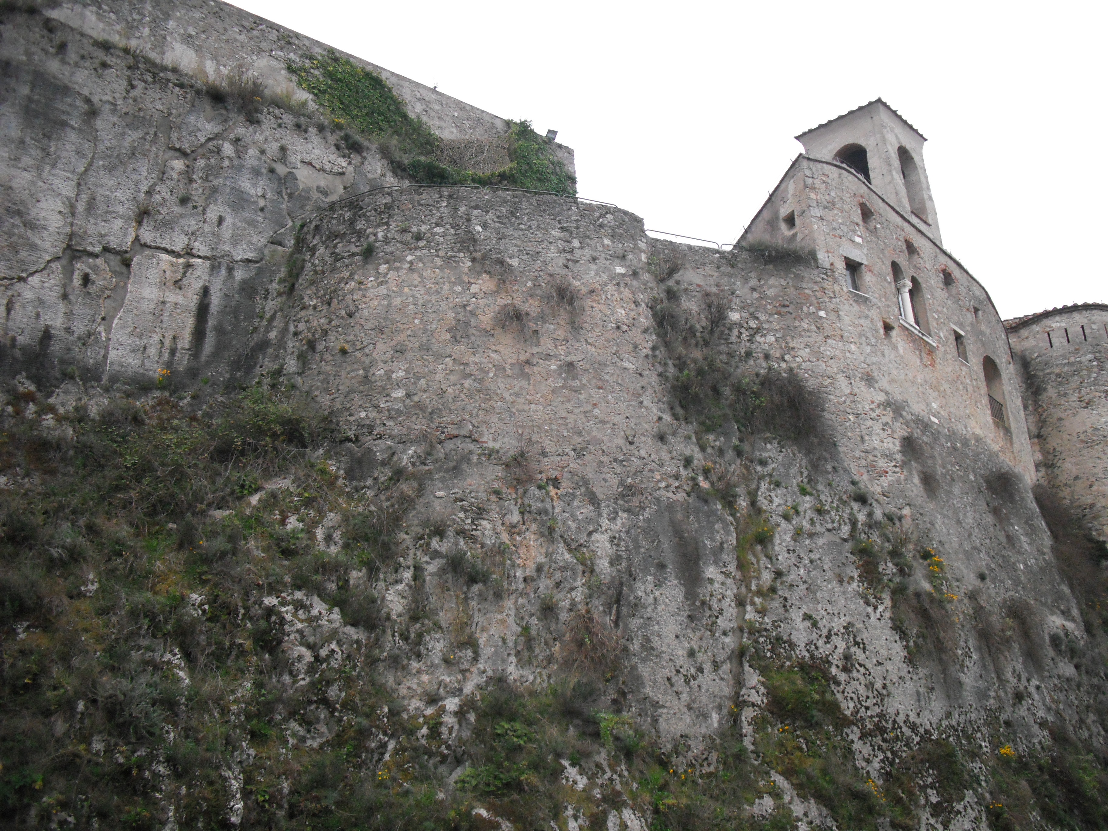 Rocca malaspina di massa